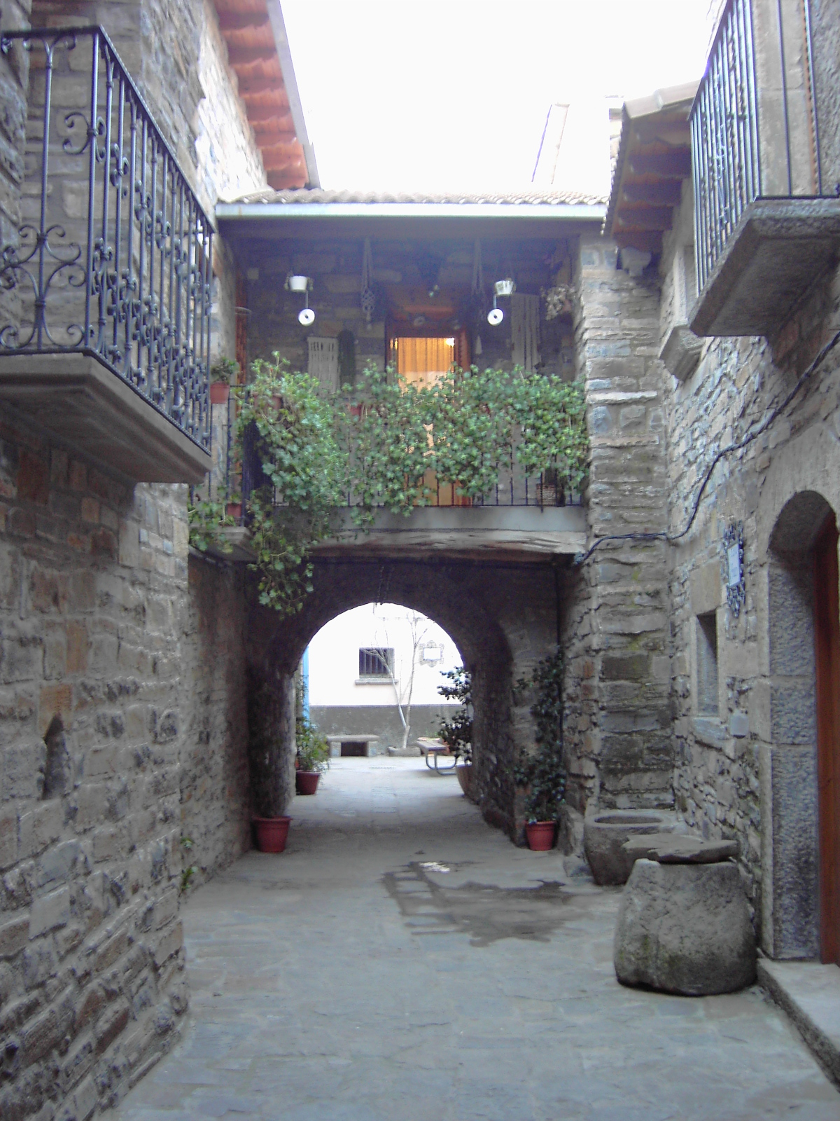 Un arco con balconeras sobre él, en El Pueyo de Araguás. La calle central constituye el único pasaje tradicional del pueblo, cuyas casas antaño no tenían puertas a otra parte. De esta manera, las fachadas traseras de sus edificios constituían un muro de defensa para sus habitantes en caso de conflicto. Hoy en día el pueblo se encuentra reformado, y por ello en algunas de sus casas se han practicado puertas directamente al exterior, a ambos lados del núcleo se han habilitado sendos paseos que permiten a los visitantes disfrutar de las vistas sobre el Valle del Cinca a uno de sus lados, o sobre el Valle de la Fueva y la Sierra Ferrera al otro.